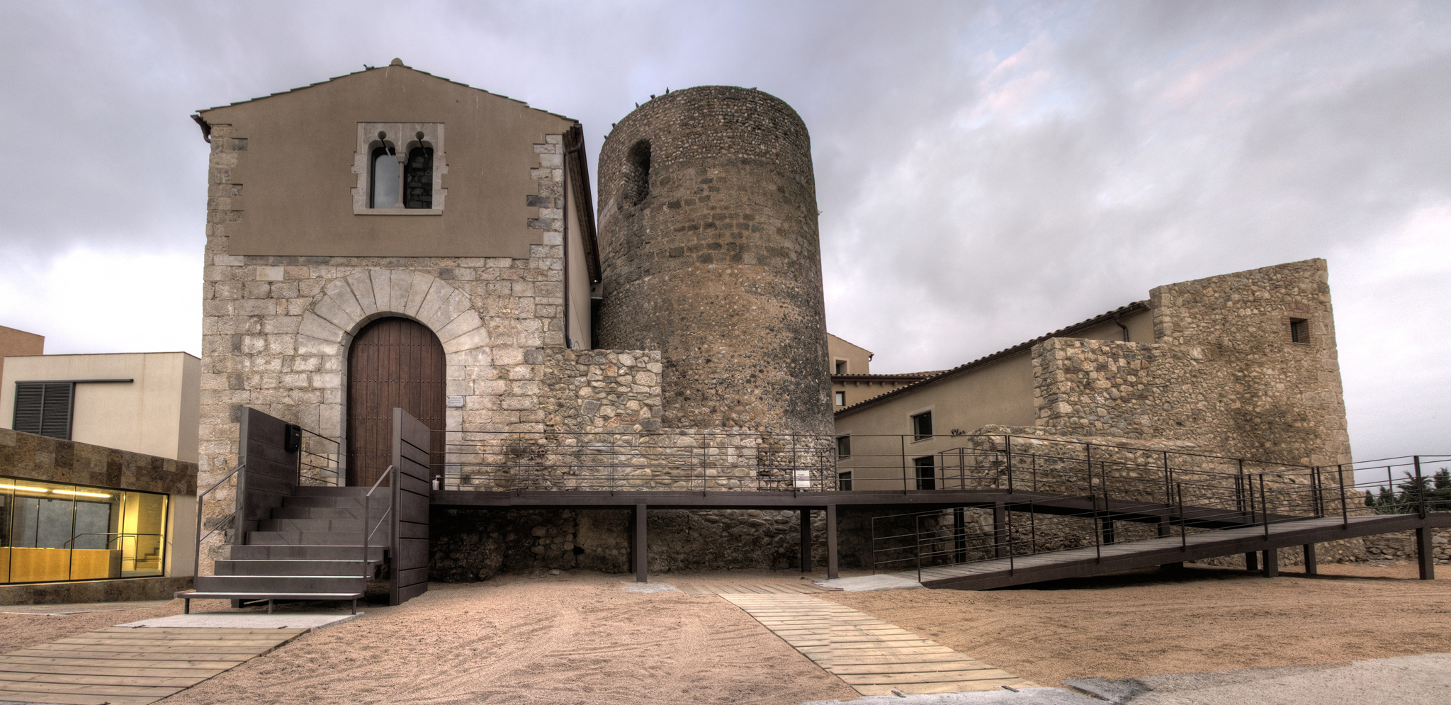 Castell de Vila-sacra